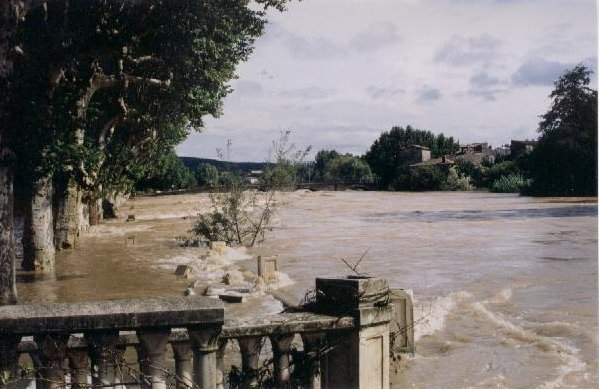 Le Vidourle hors de son lit. (Txo, )